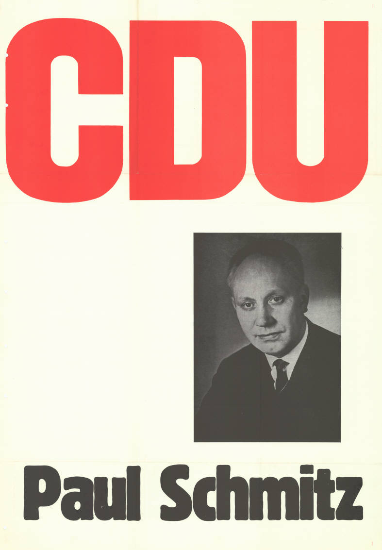 CDU Paul Schmitz Abbildung: Porträtfoto Plakatart: Kandidaten-/Personenplakat mit Porträt Objekt-Signatur: 10-009 : 523 Bestand: Landtagswahlplakate Nordrhein-Westfalen (10-009) GliederungBestand10-18: Landtagswahlplakate Nordrhein-Westfalen (10-009) » CDU Lizenz: KAS/ACDP 10-009 : 523 CC-BY-SA 3.0 DE